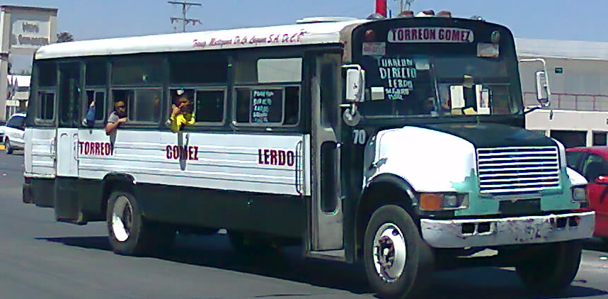 Autobús de Transportes Moctezuma de La Laguna, número económico 70.